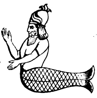 Oannes auf einem Basrelief aus Khorsabad